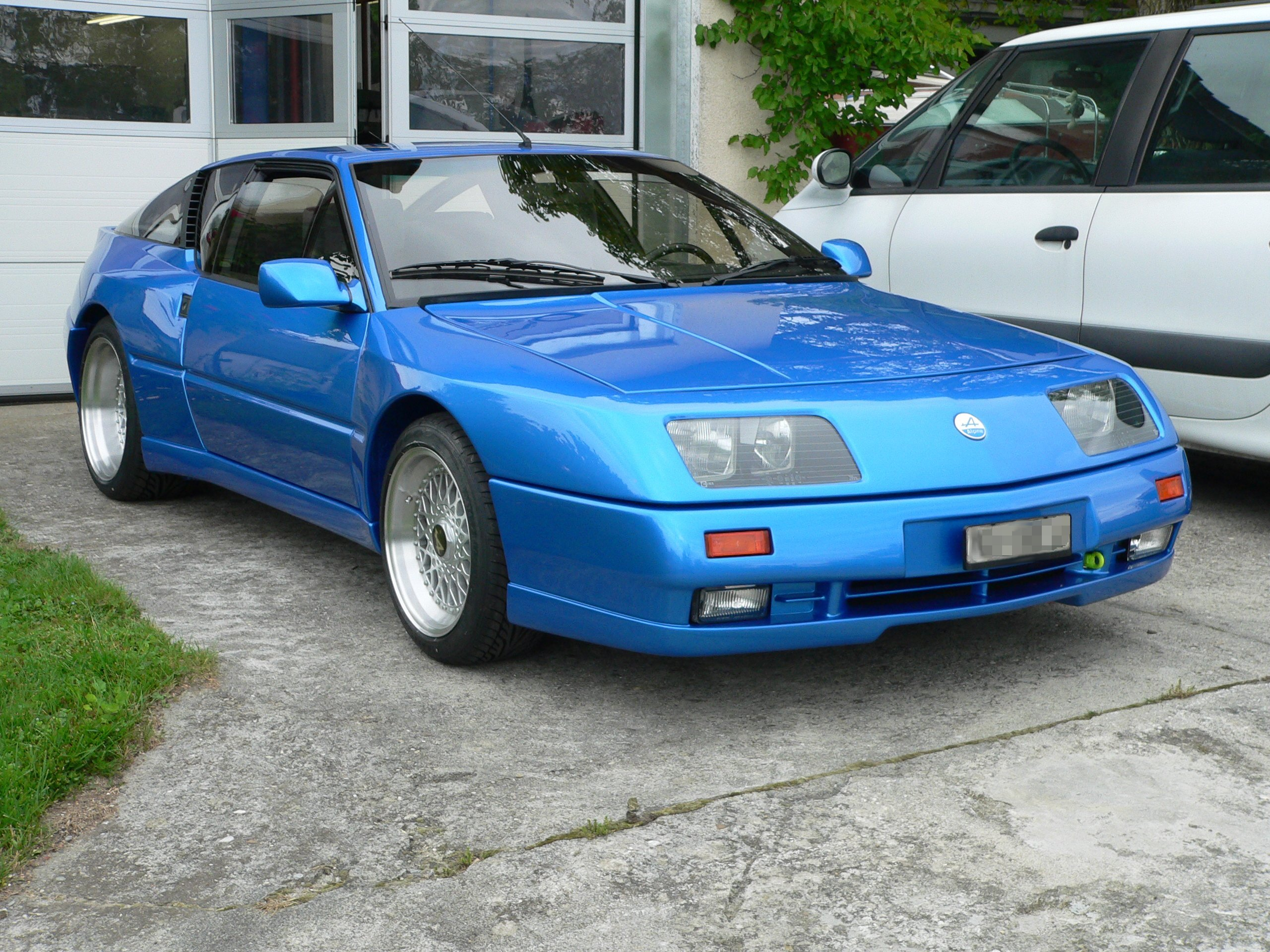 Renault Alpine GTA Sondermodell Le Mans